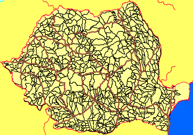 Romanian Road map from public domain DCW and ESRI data